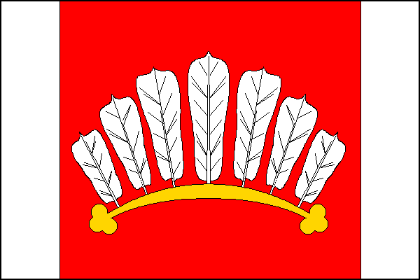 vlajka, Velké Meziříčí, okres Žďár nad Sázavou